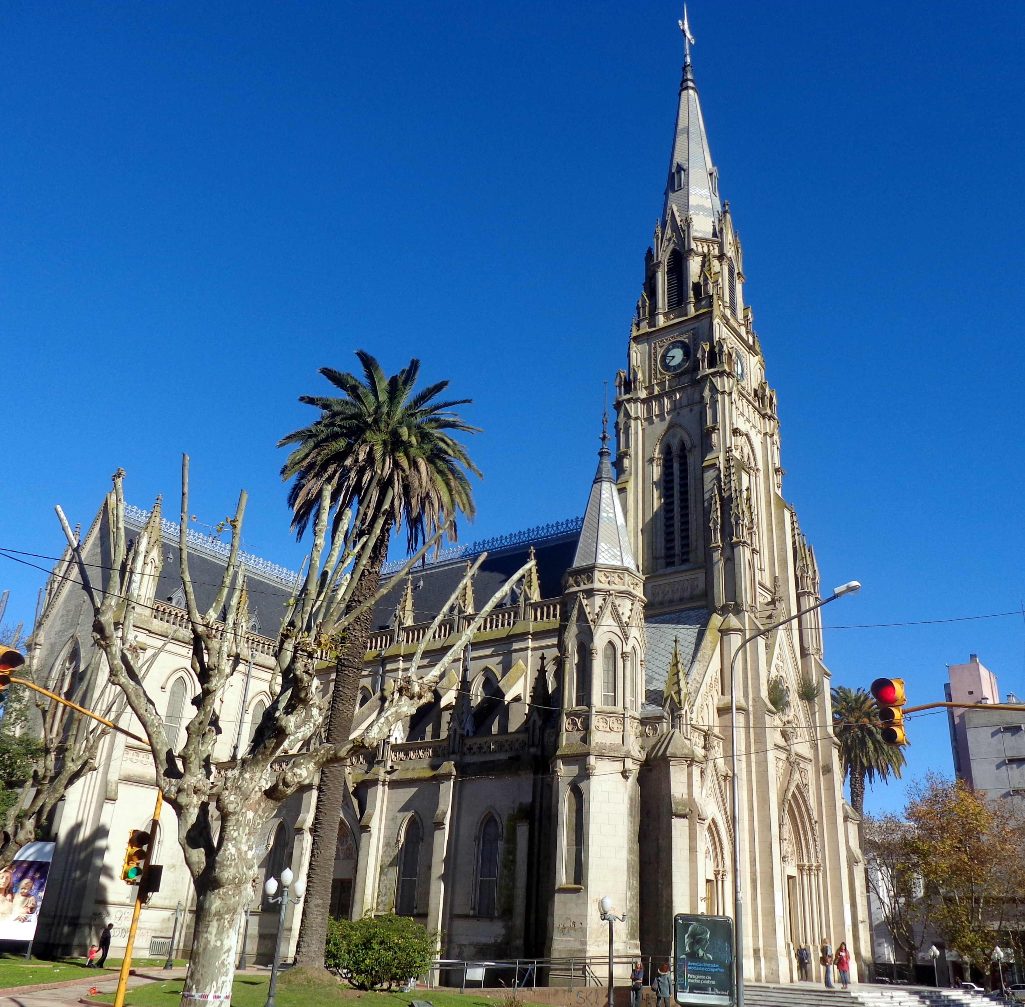 Catedral Basílica de Mercedes-Luján, conocida como Catedral Basílica Nuestra Señora de las Mercedes, en la ciudad de Mercedes, provincia de Buenos Aires, Argentina. Es cabeza de la Arquidiócesis de Mercedes - Luján